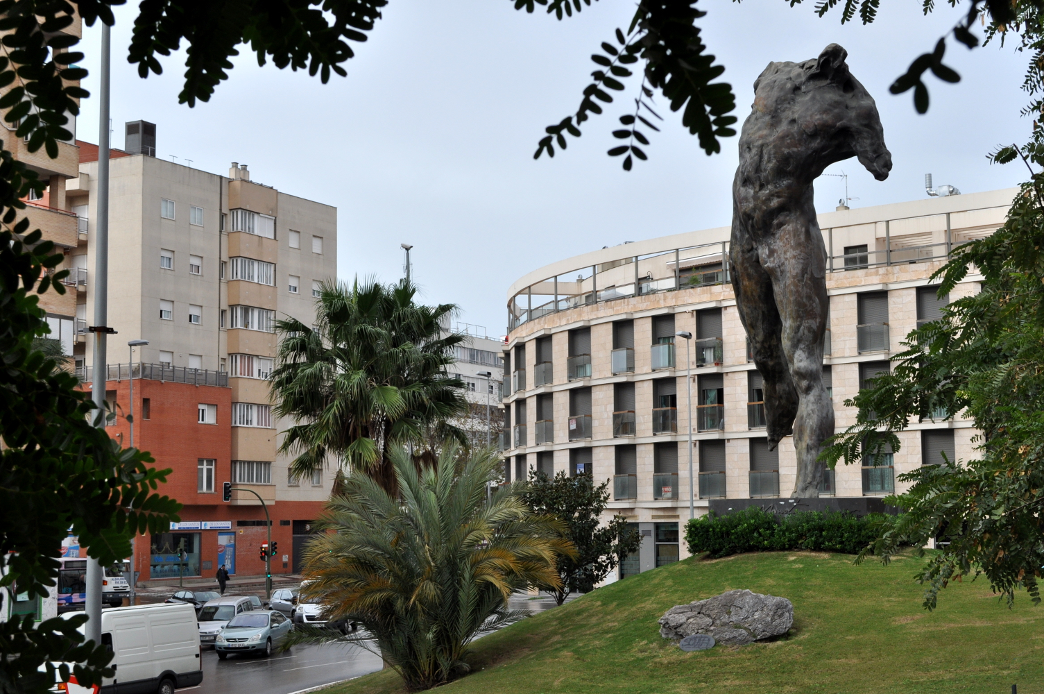 Rotonda del Minotauro